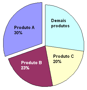 my pic